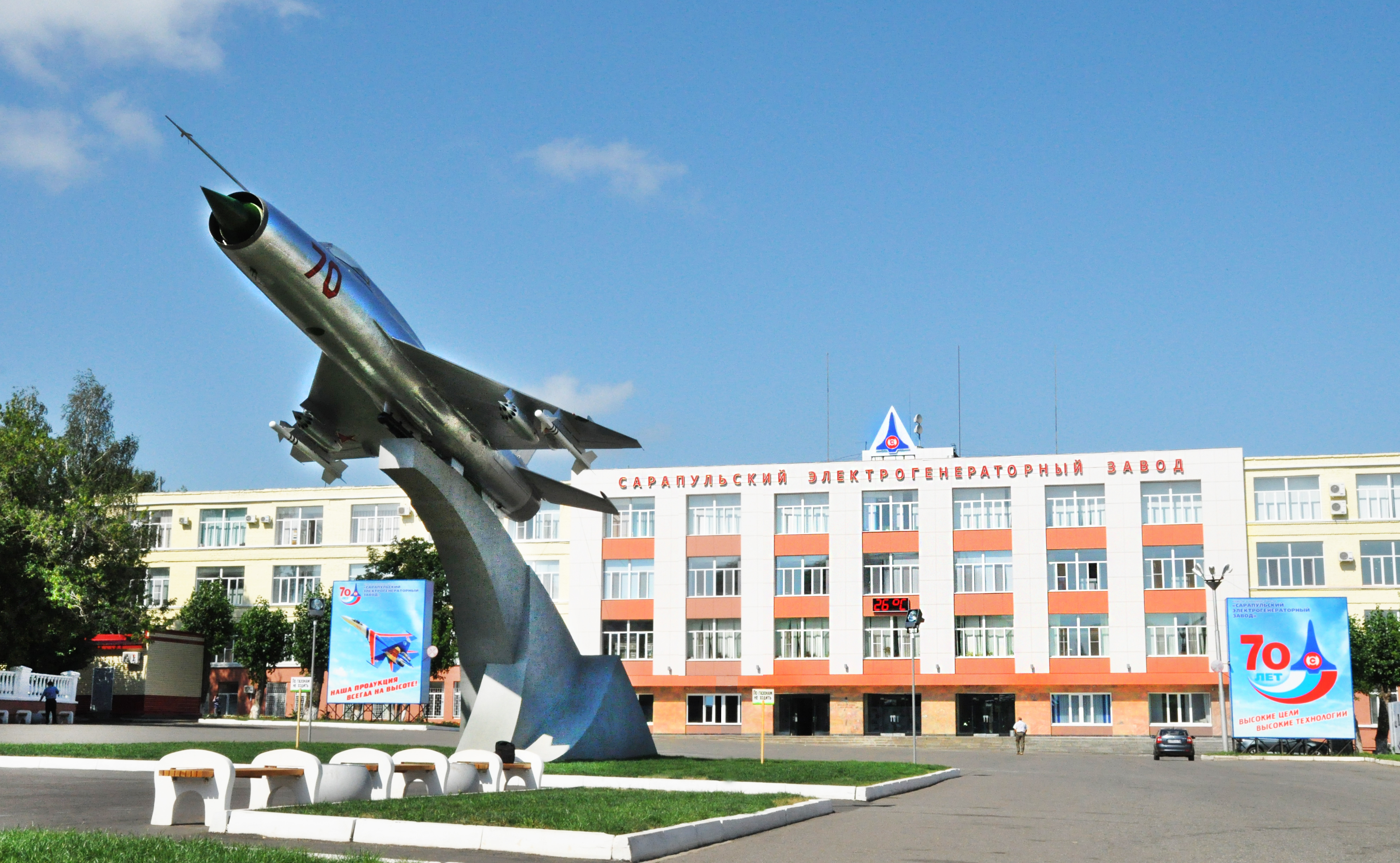 Вид на площадь ОАО "СЭГЗ" после установки памятника МИГ-21 к 70-летию предприятия